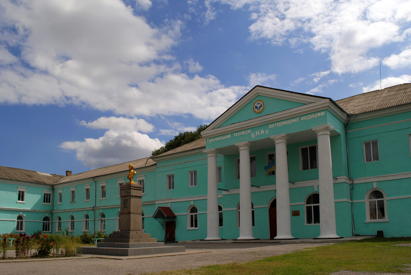 Малий (новий) палац Потоцьких (мур.), Тульчин, вул. Леніна,55